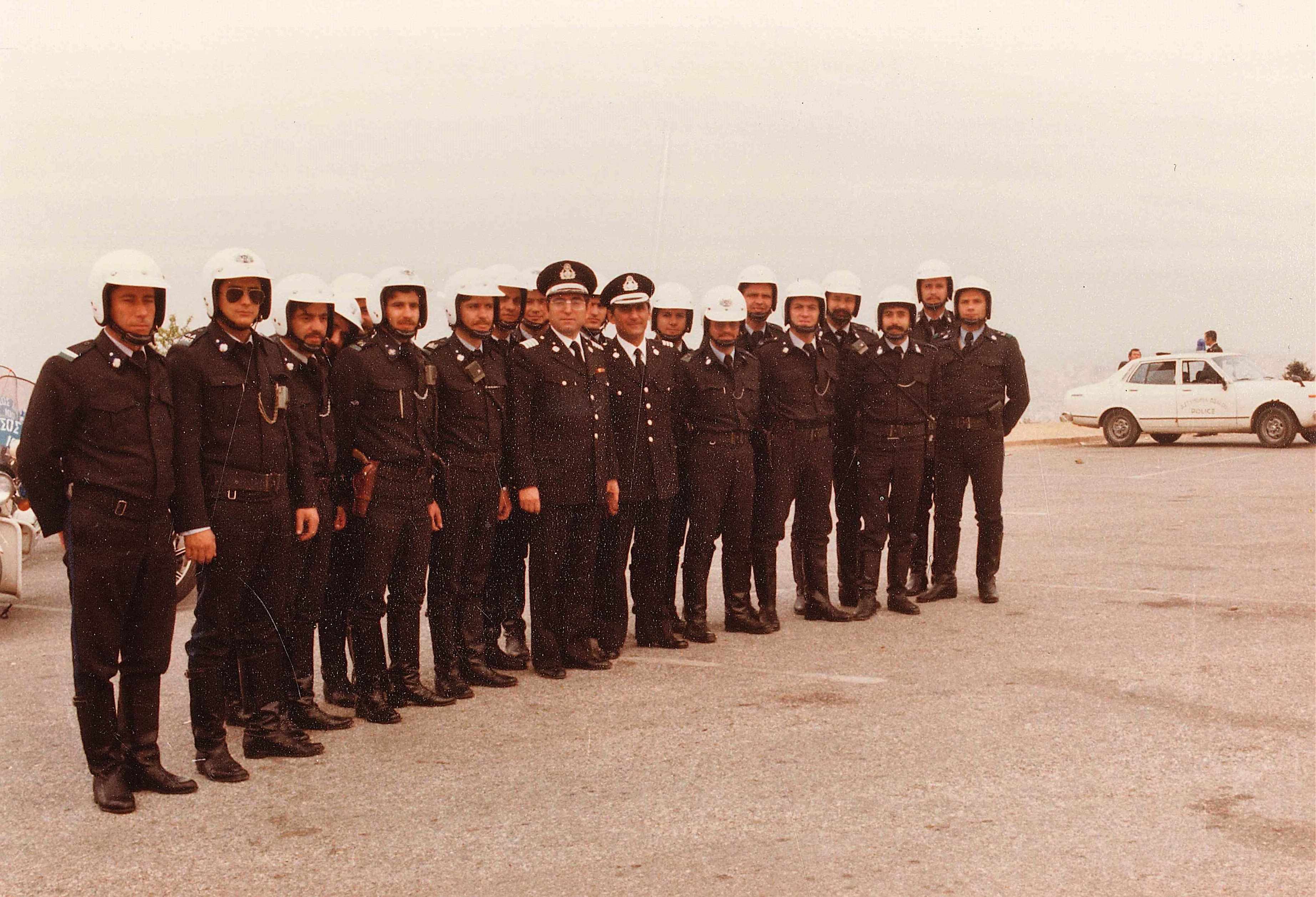 Η αρχική Ομάδα Ζ με τον Μανώλη Φραγκ. Σηφάκη